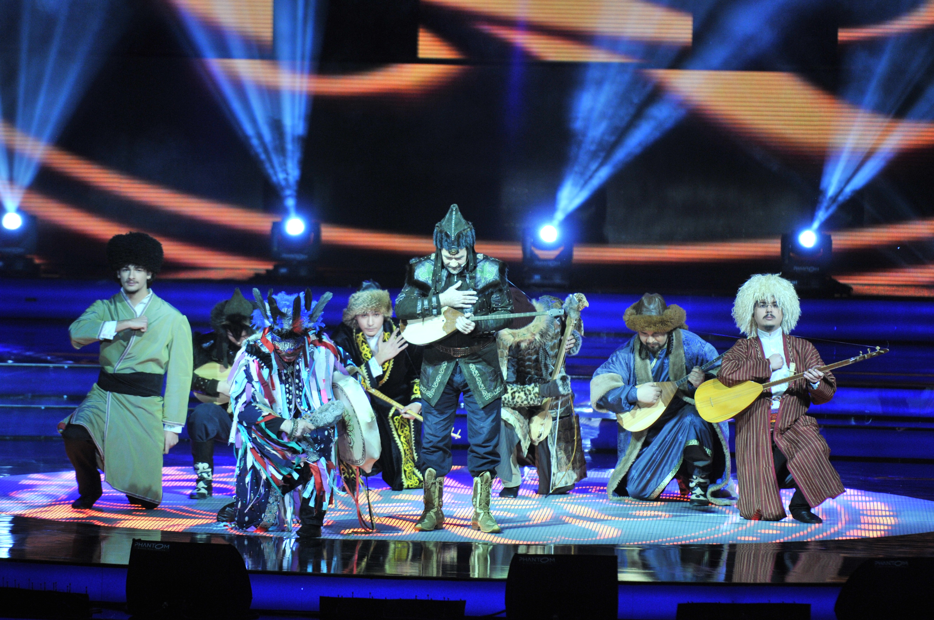 Türkvizyon Açılış Gösterisi